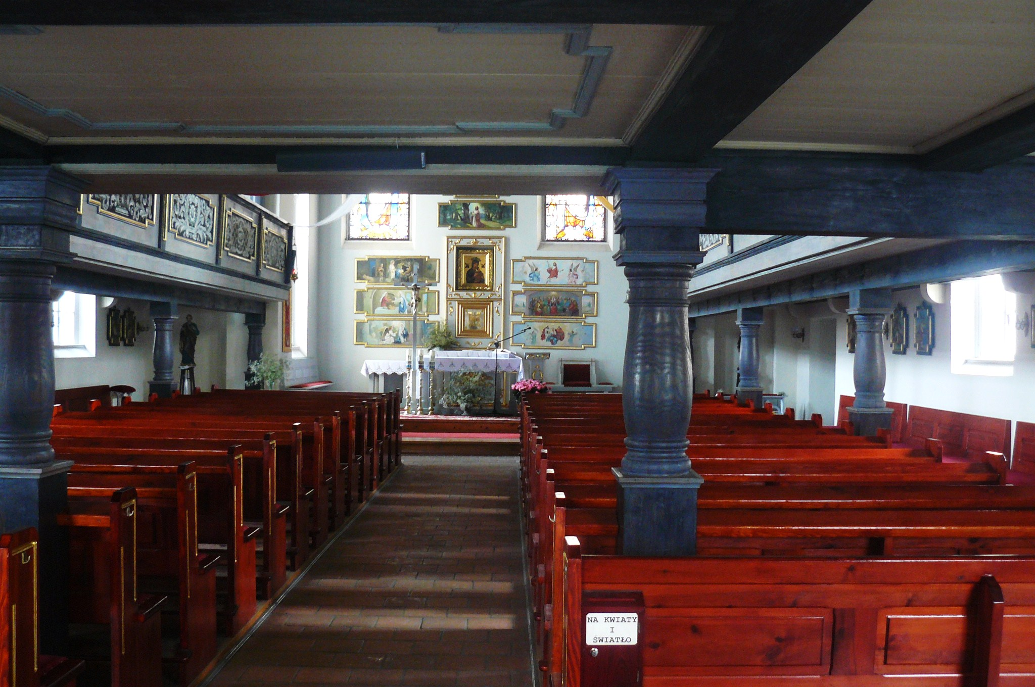 Kościół MB Nieustającej Pomocy, Nowe Skalmierzyce.